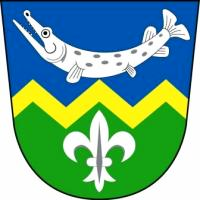 Jedousov - znak obce.